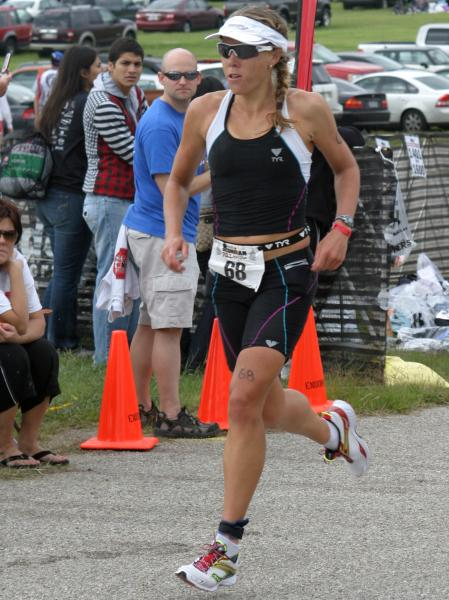 Erin O'Hara beim Ironman 70.3 Austin (2009)